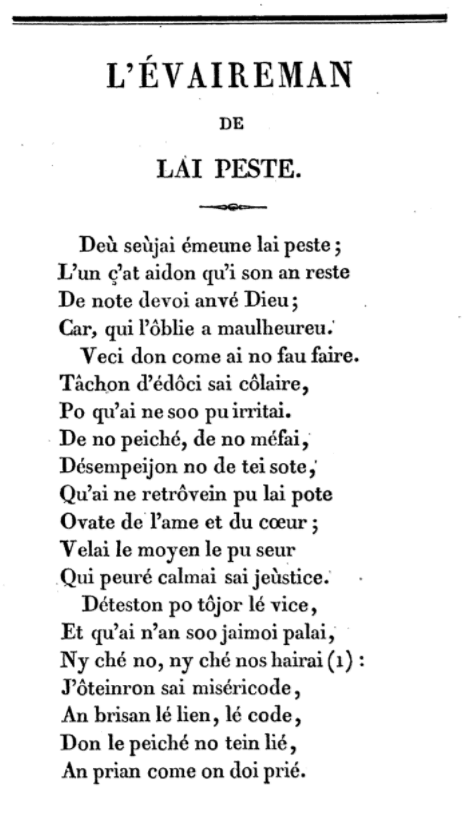 Début de l'Evaireman de lai peste d'Aymé Piron en bourguignon